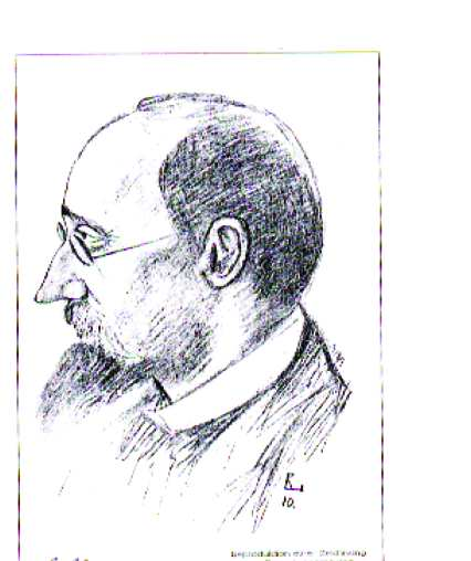 Rosa Luxemburg zeichnet Robert Umbreit 1910. nach einem Original im Stadtarchiv Dortmund Robert Umbreit war Geschäftsführer der Rheinisch-Westfälischen Arbeiter-Zeitung in Dortmund